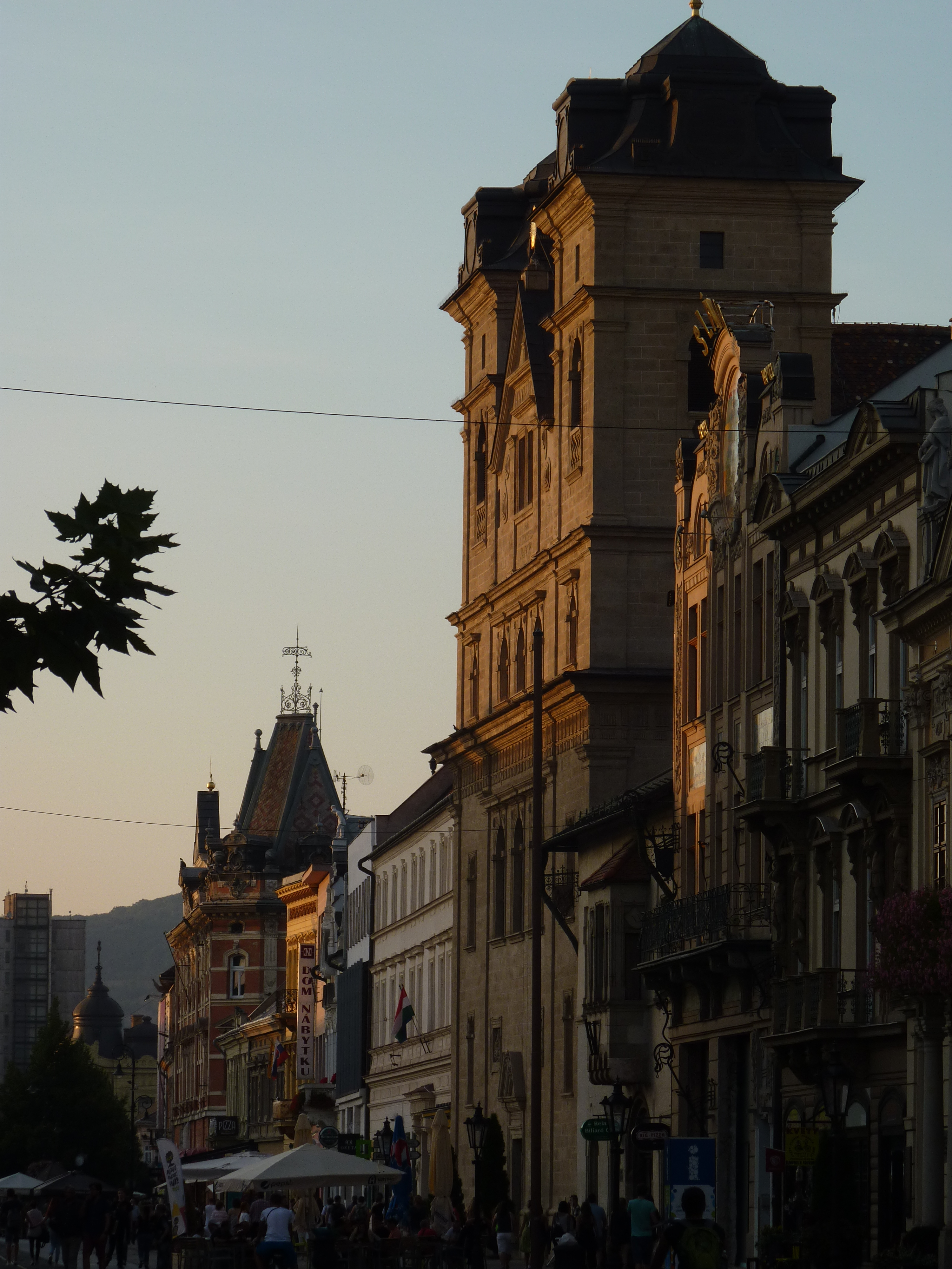 Kostol